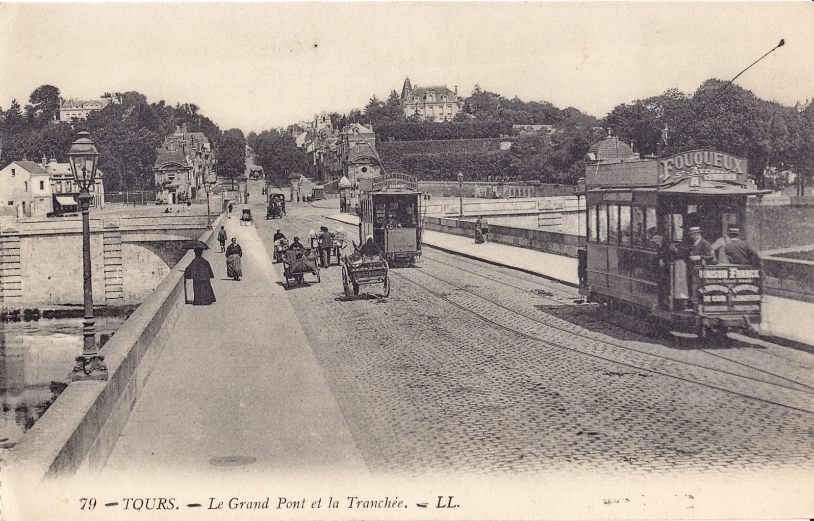 Carte postale ancienne éditée par LL, n°79 : TOURS - Le Grand Pont et la Tranchée